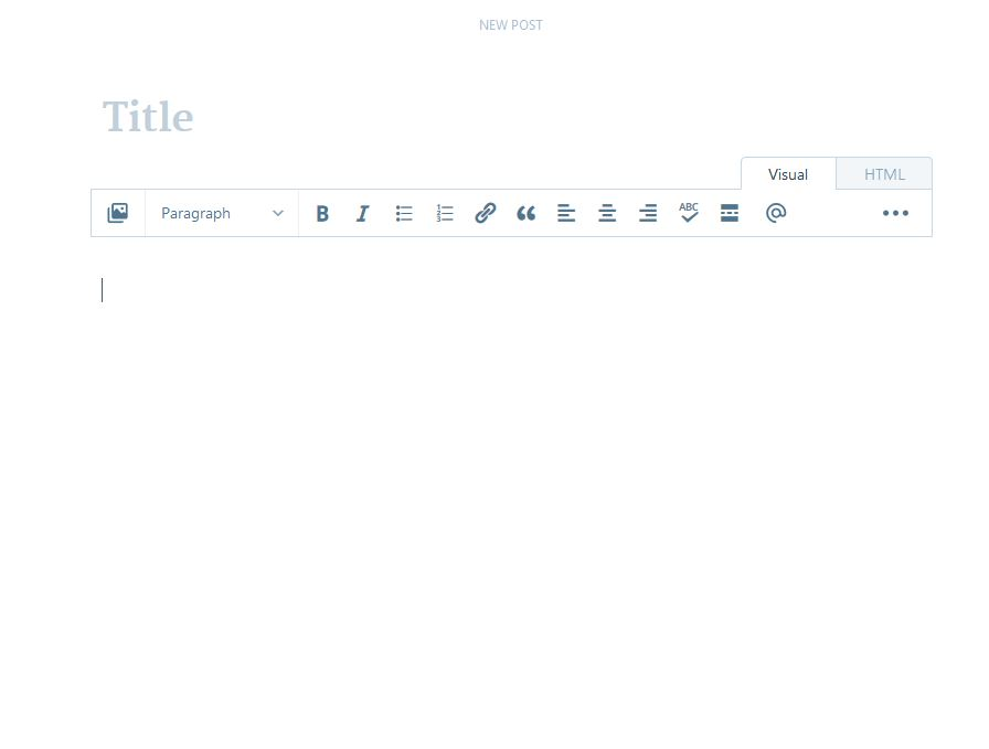 Уеб редактор за публикуване на нов блог-пост в WordPress.